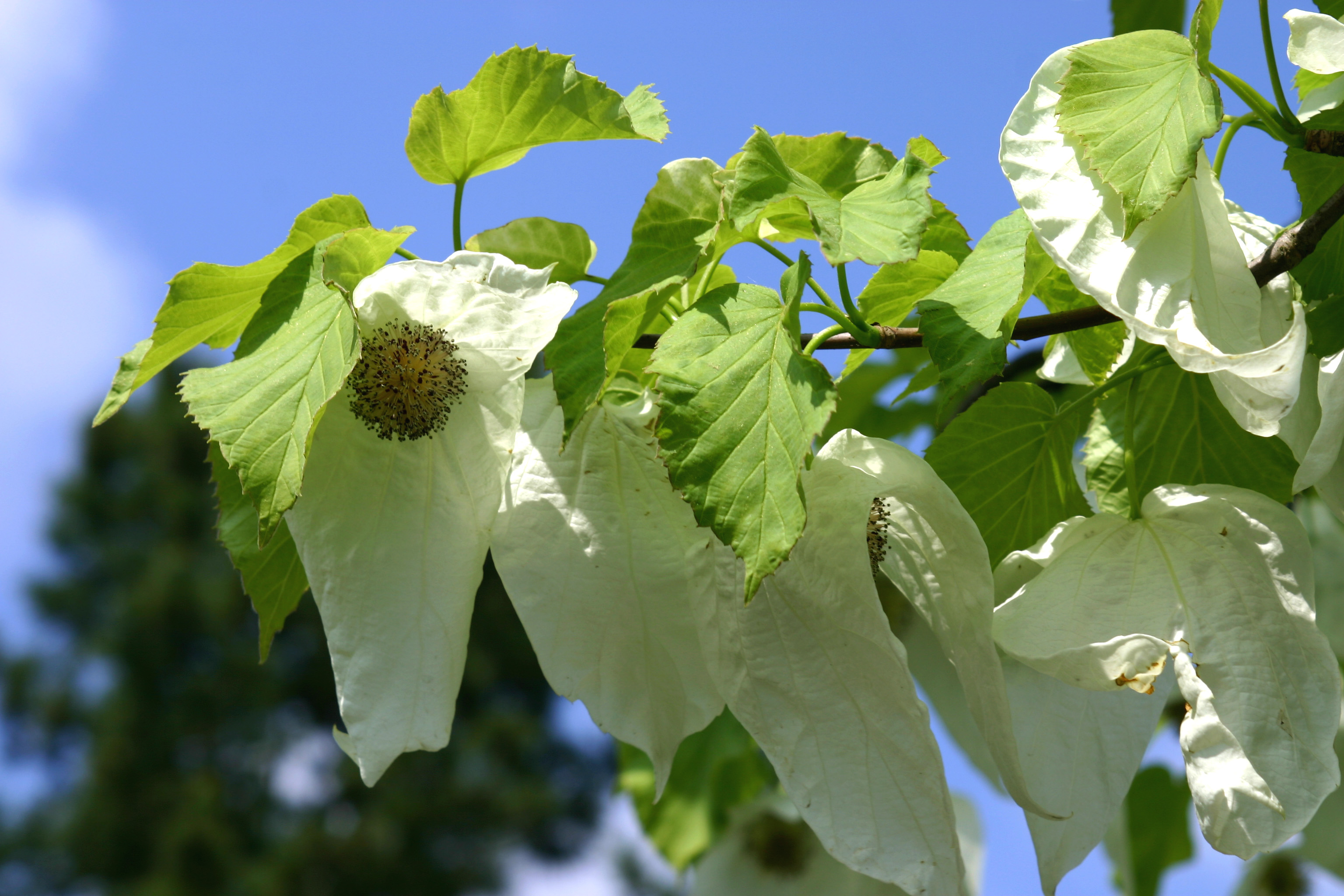 Blüten des Taschentuchbaumes im Botanischen Garten der Westfälischen Wilhelms-Universität Münster